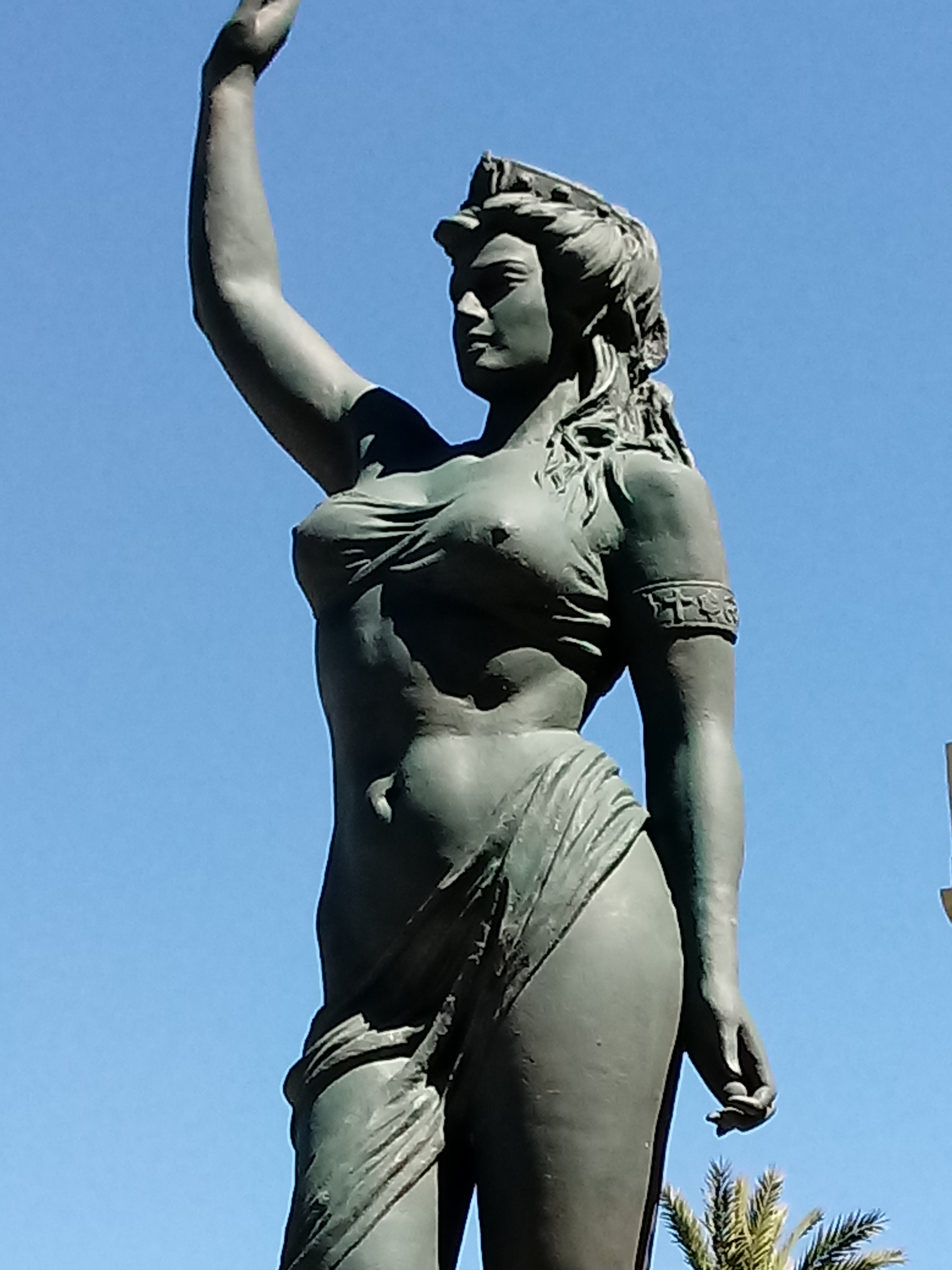 Ampliación de la imegen de la estatua